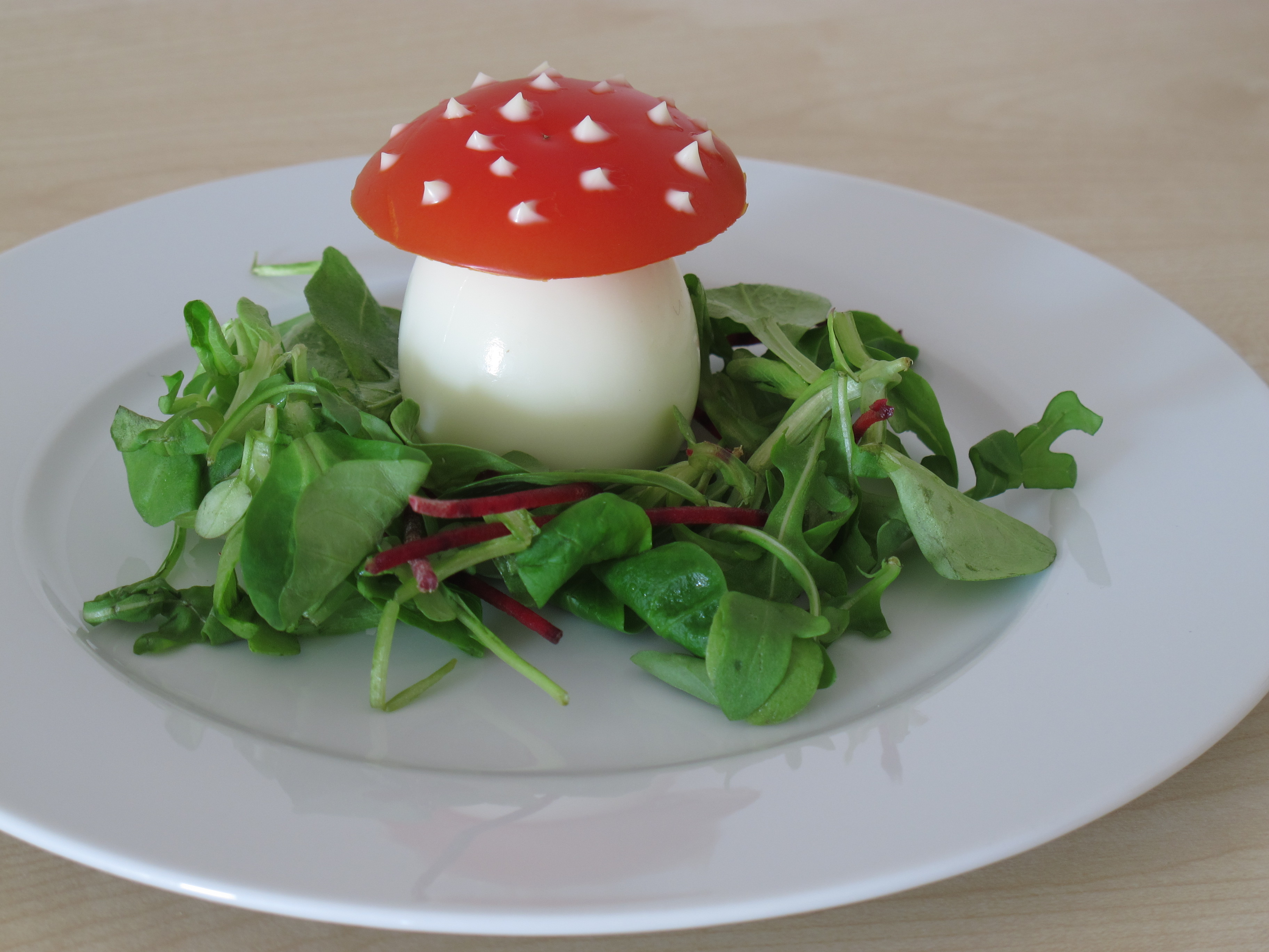 Fliegenpilzei (gekochtes Ei mit Tomate oben drauf) auf Salat